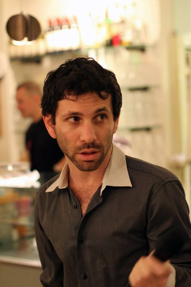 בתולעת ספרים